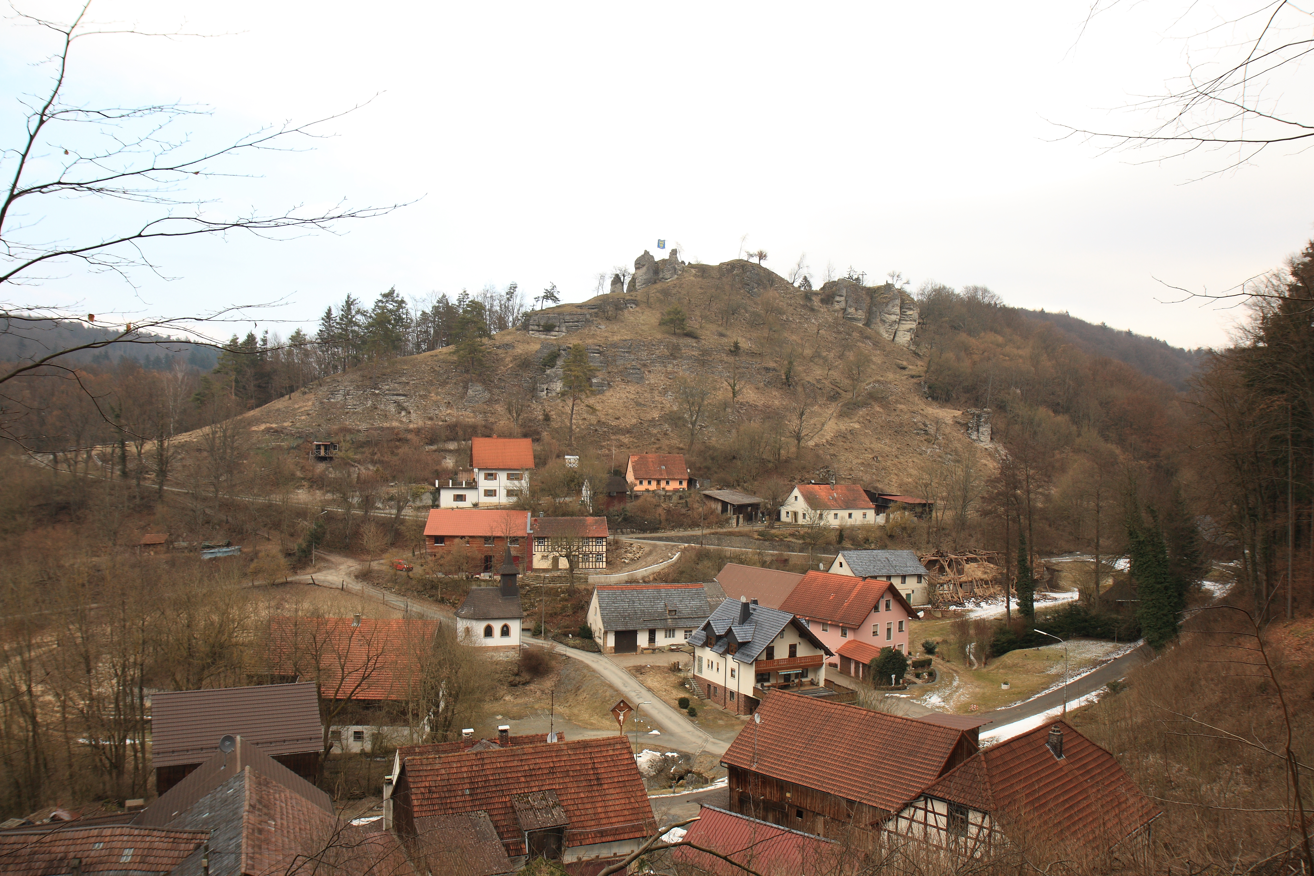 Burgstall Niesten - Ansicht des Burgberges